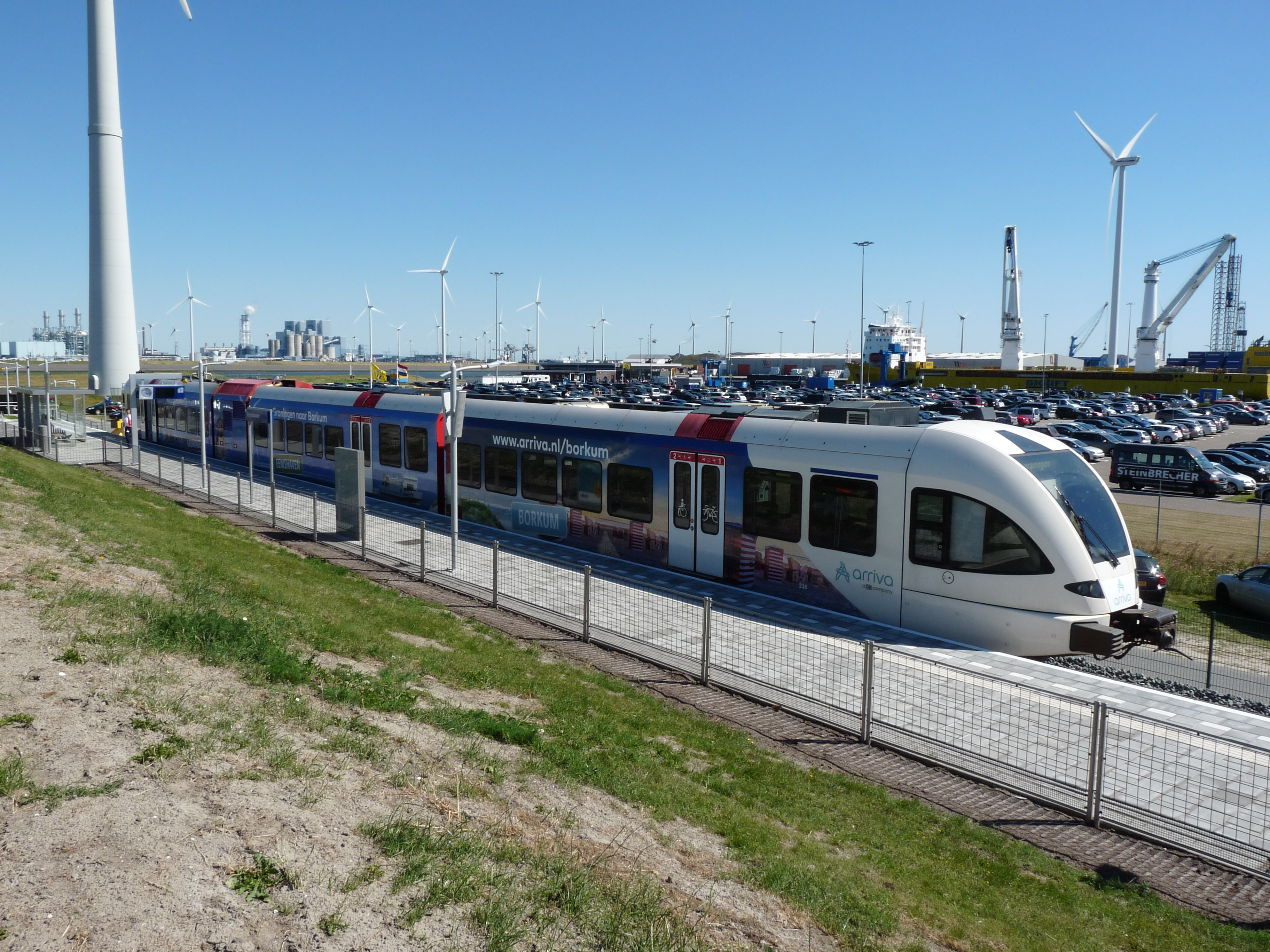 Arrivatrein bij het nieuwe station Eemshaven